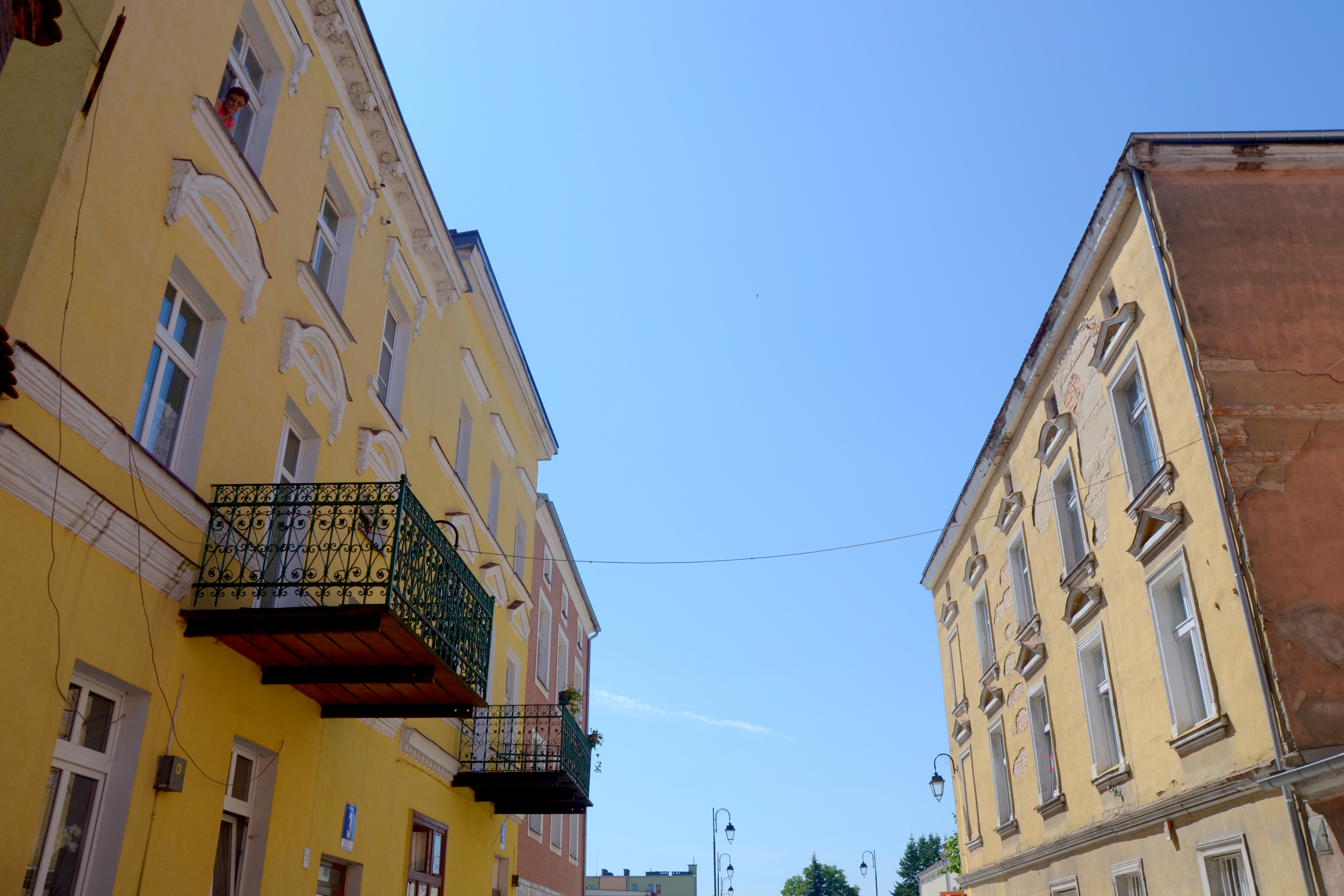 Barczewo, dom, XVIII, 2 poł. XIX